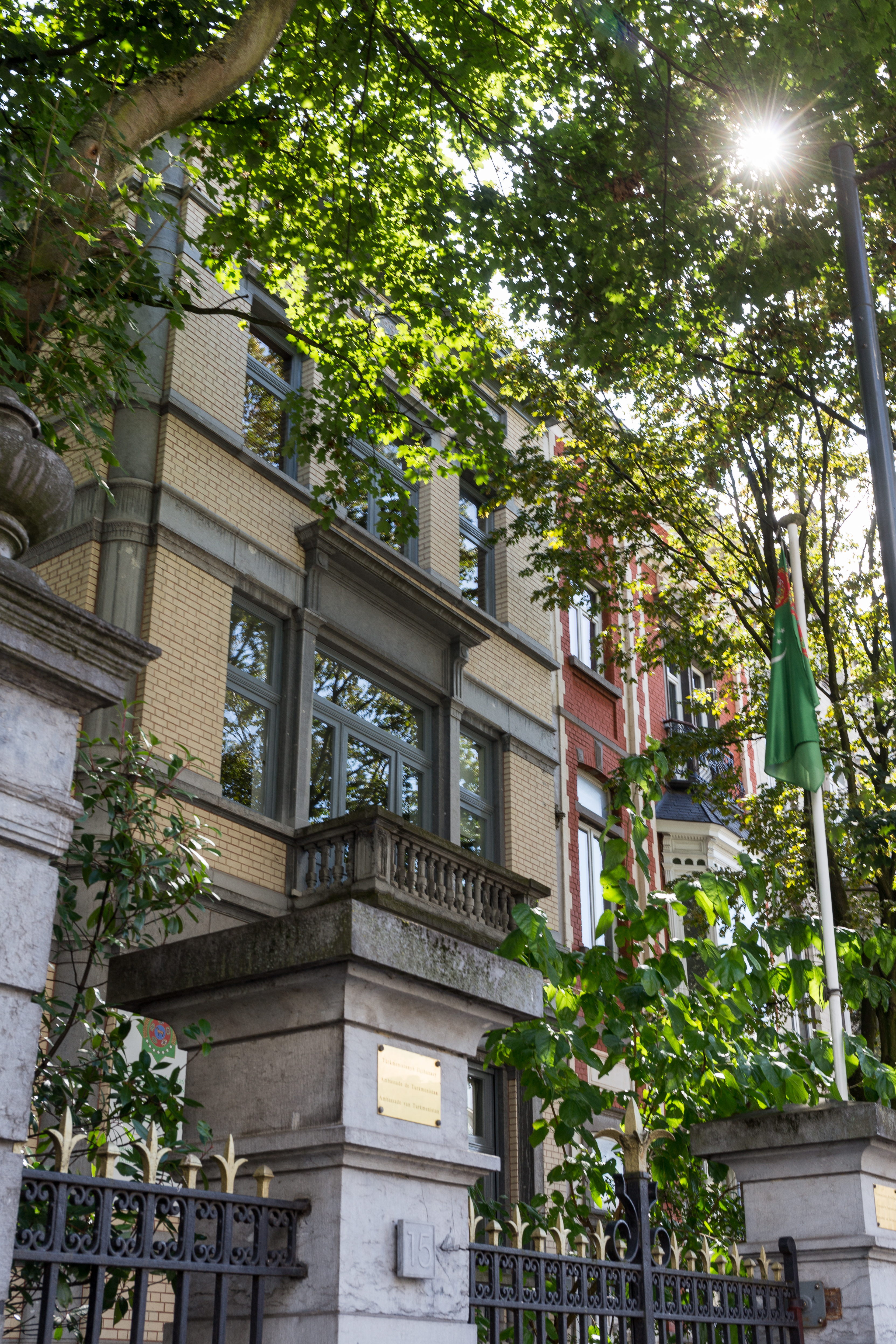 Ambassade du Turkménistan en Belgique, boulevard Général Jacques 15 à Ixelles.